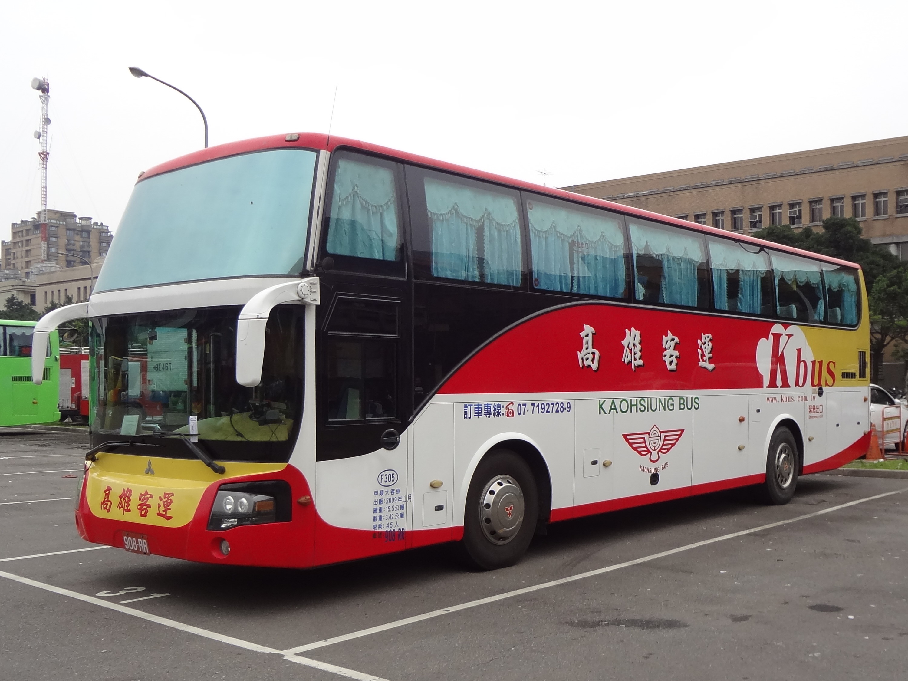 高雄客運2009年三菱扶桑RM11GNL3遊覽車908-RR。